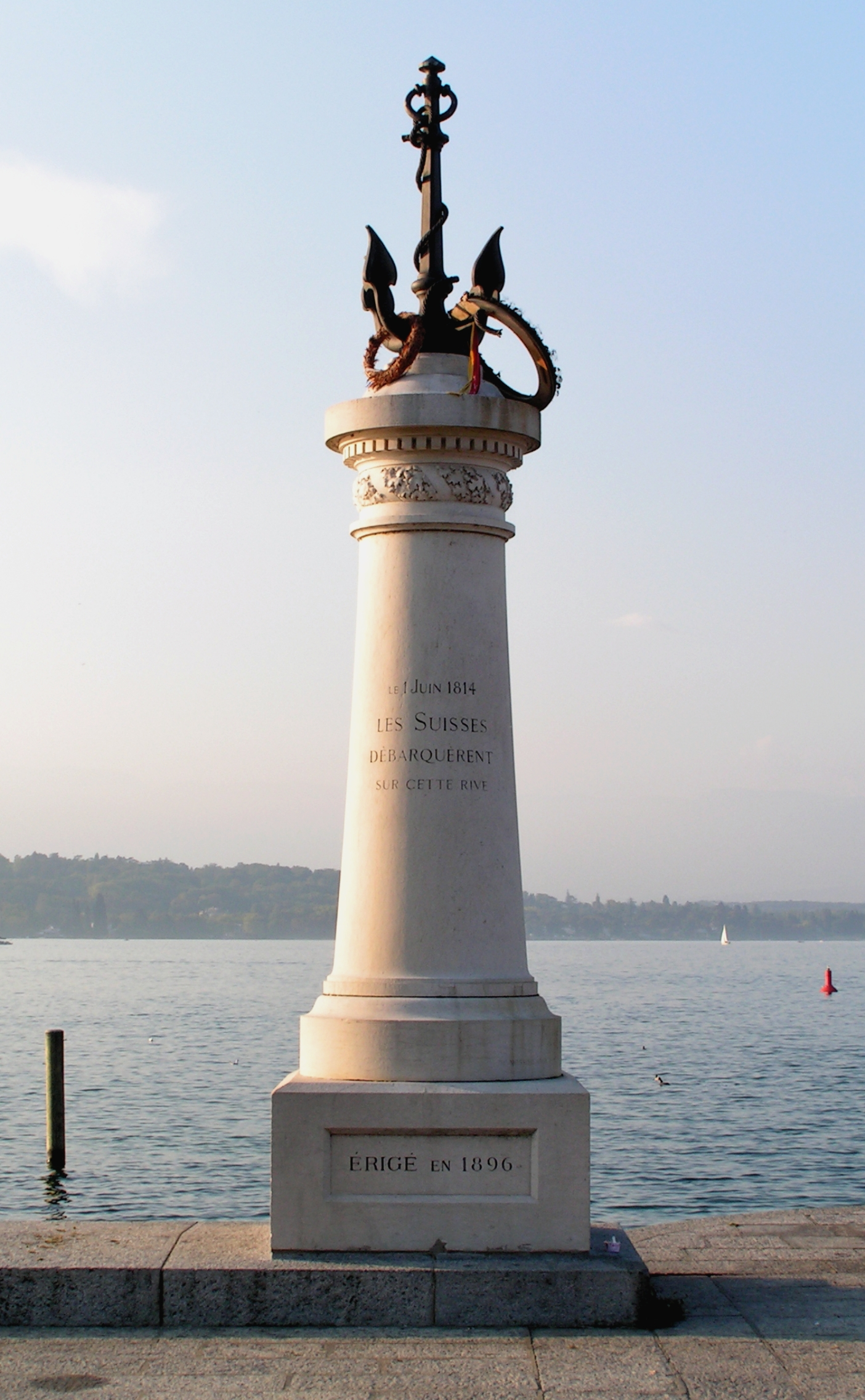 Quai Gustave-Ador, Genève. Le monument du Port-Noir. Il commémore le 1er Juin 1814, date à laquelle les troupes suisses débarquaient au Port-Noir marquant l'entrée de Genève dans la Confédération.